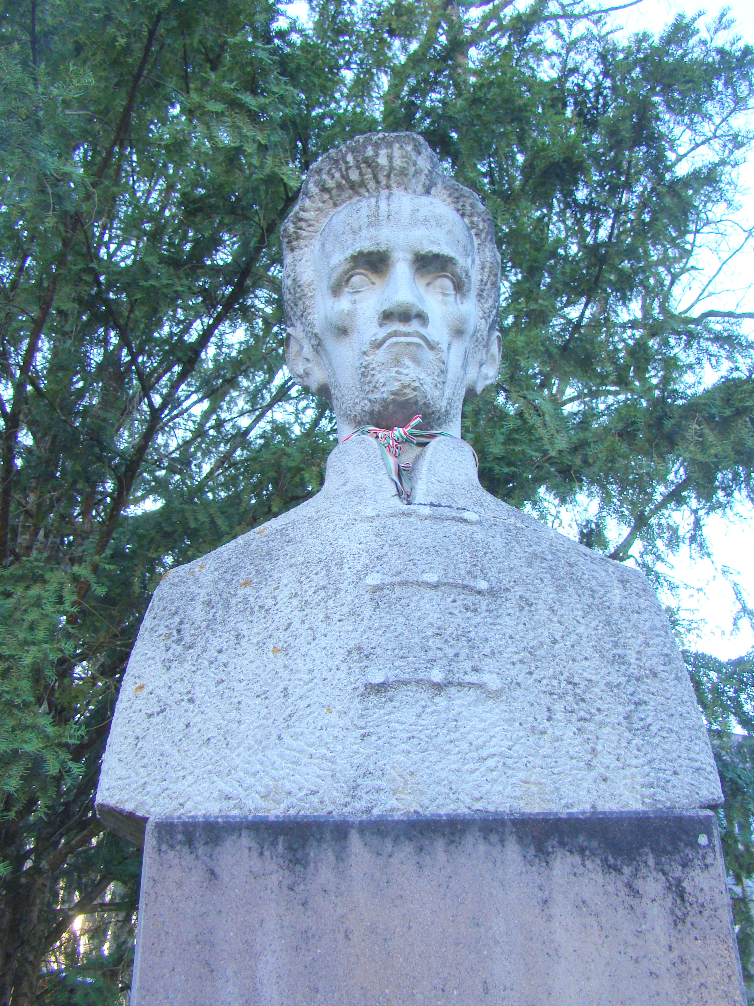 Bustul lui Sándor Petőfi din Piaţa Petőfi, Sovata, judeţul Mureş